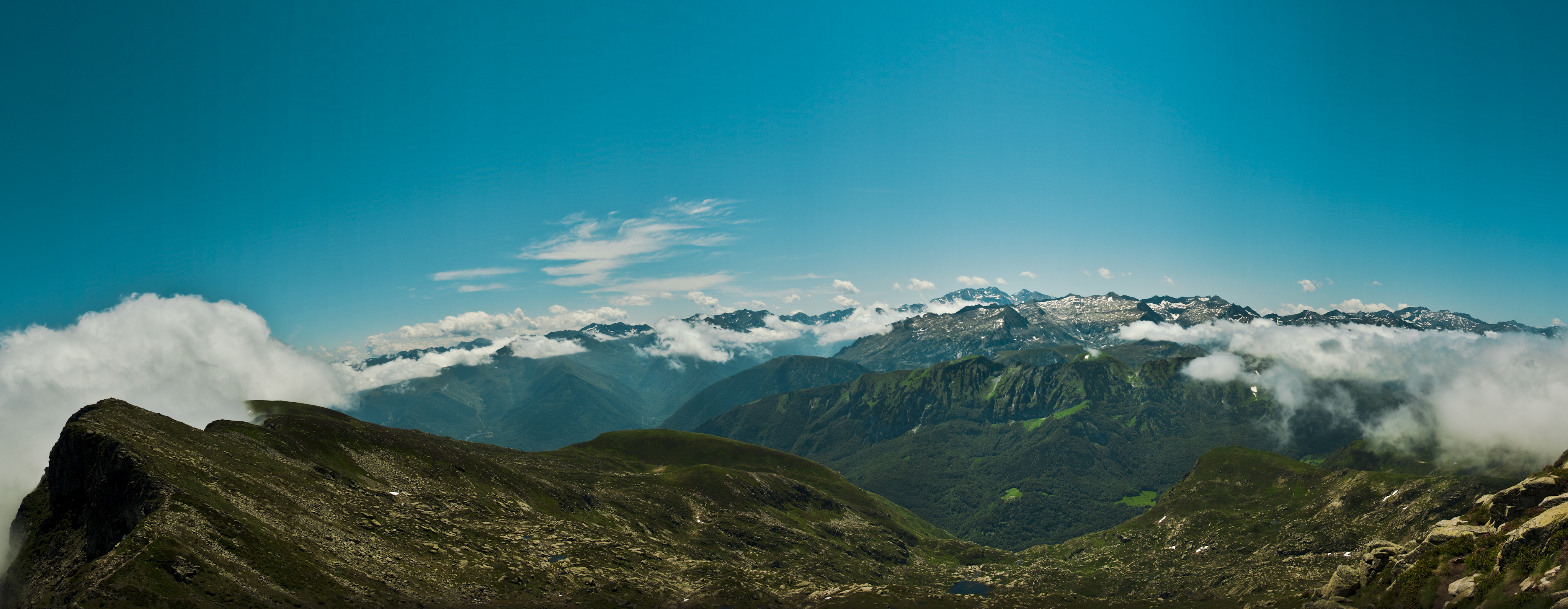 Vue sur la chaîne des Pyrénées, depuis le pics des 3 Seigneurs (Ariège, 2199m).